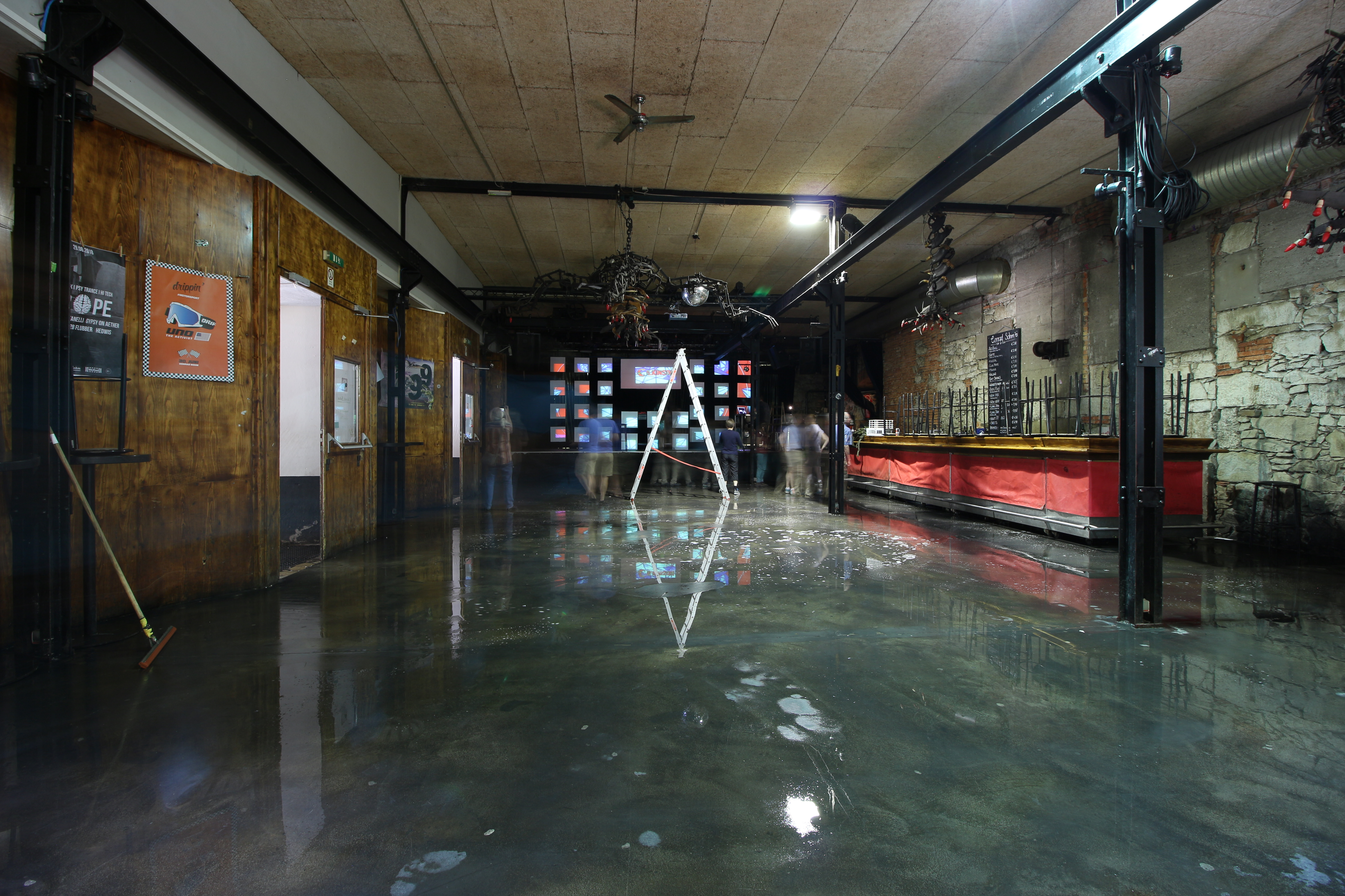 Innenraum des Veranstaltungsorts "Conrad Sohm" in Dornbirn, Vorarlberg.